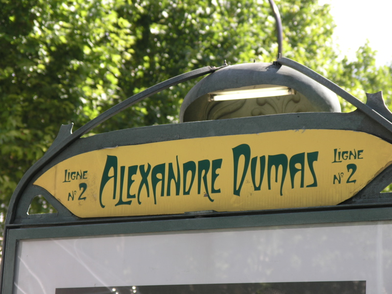 Alexandre Dumas metro entrance